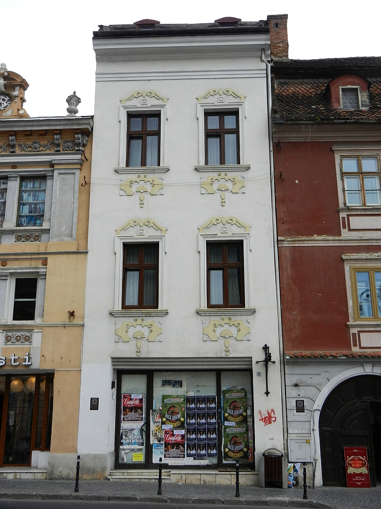 Casa monument istoric (Piata Sfatului 21)